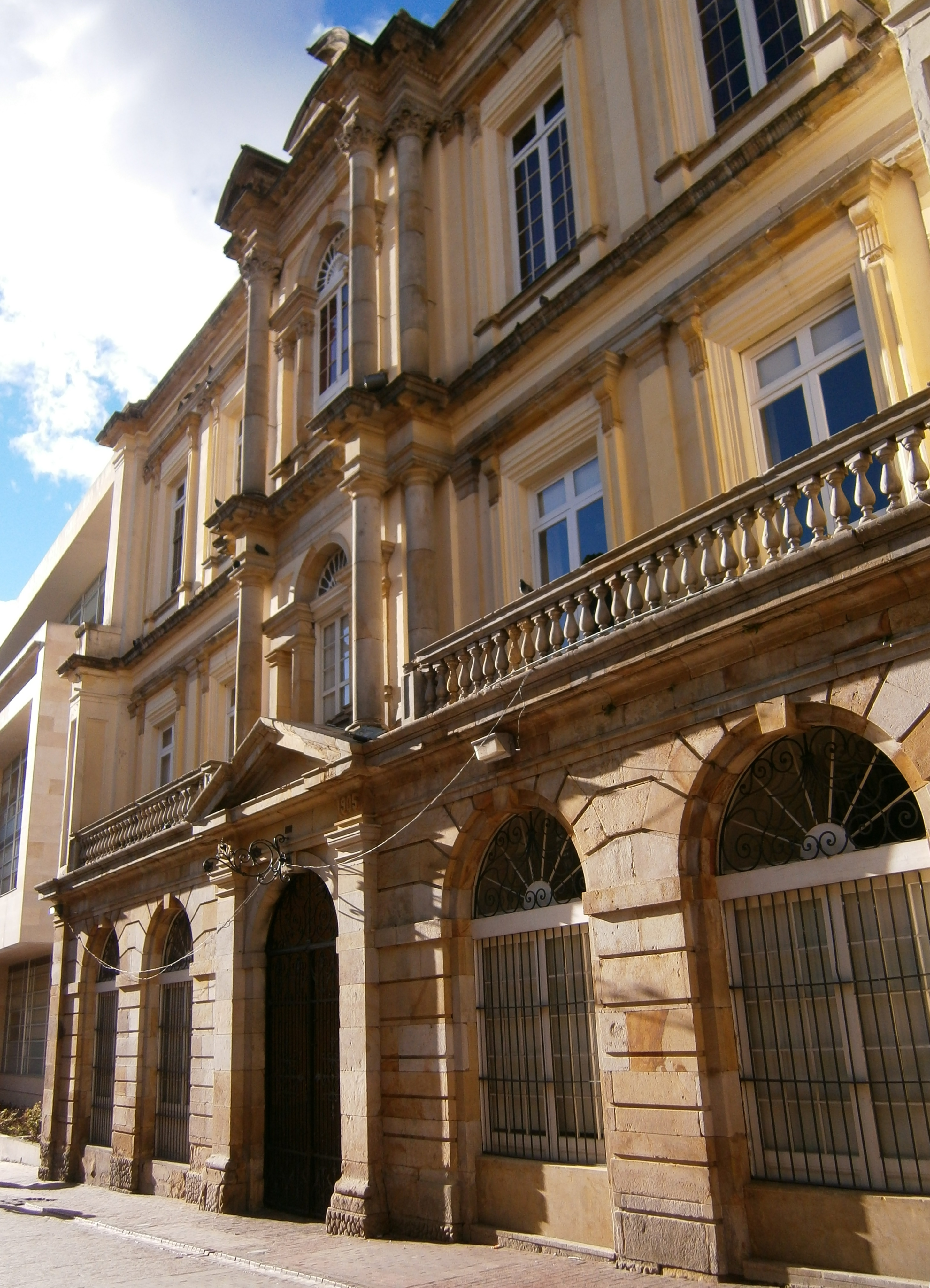 Entrada sur del palacio Liévano, Alcaldía de Bogotá.